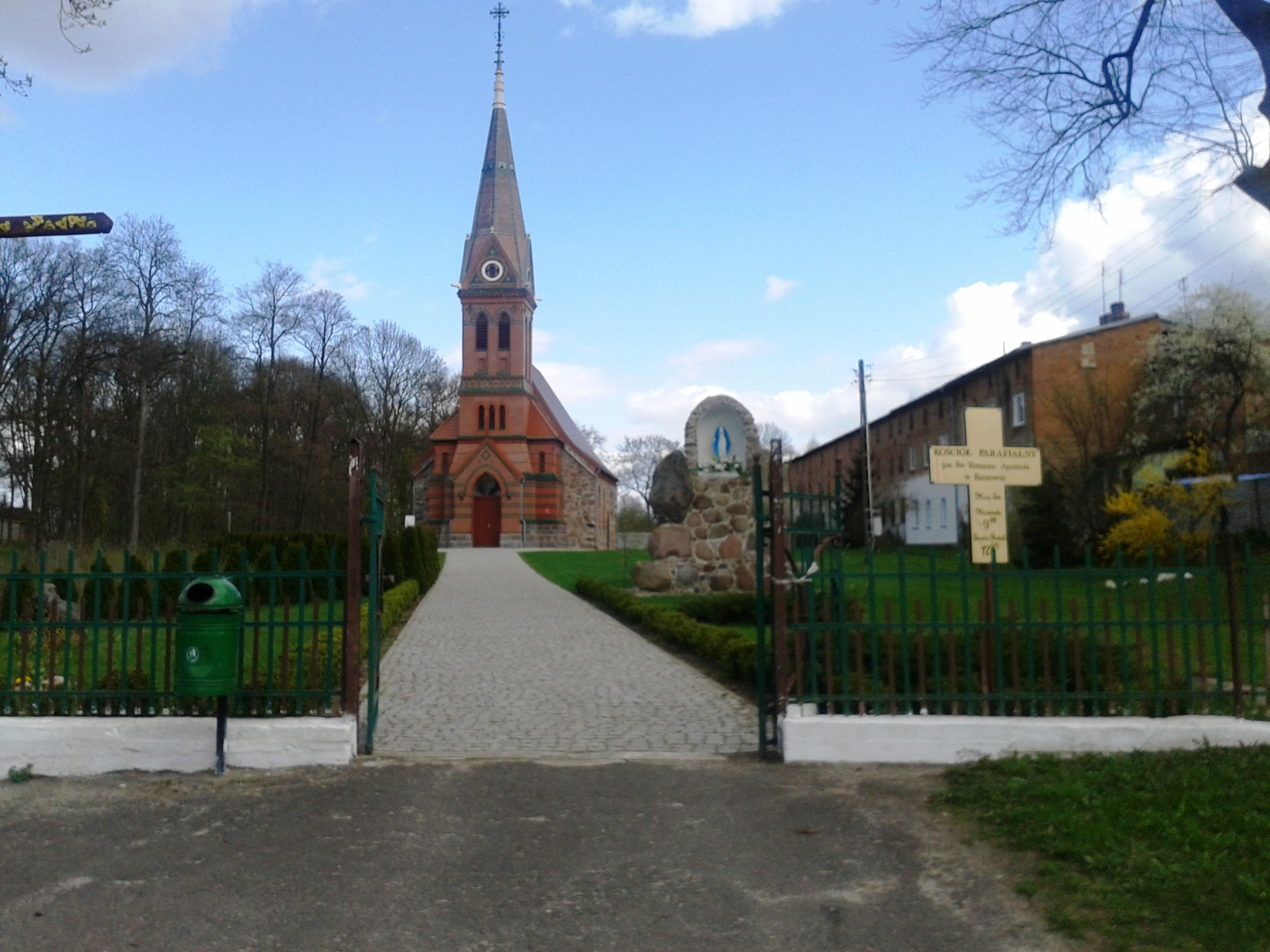 Runowo, ul. Strzelecka 6 - rzymskokatolicki kościół parafialny p.w. św. Tomasza, XIV/XV, 1860, 1882 02.1957.